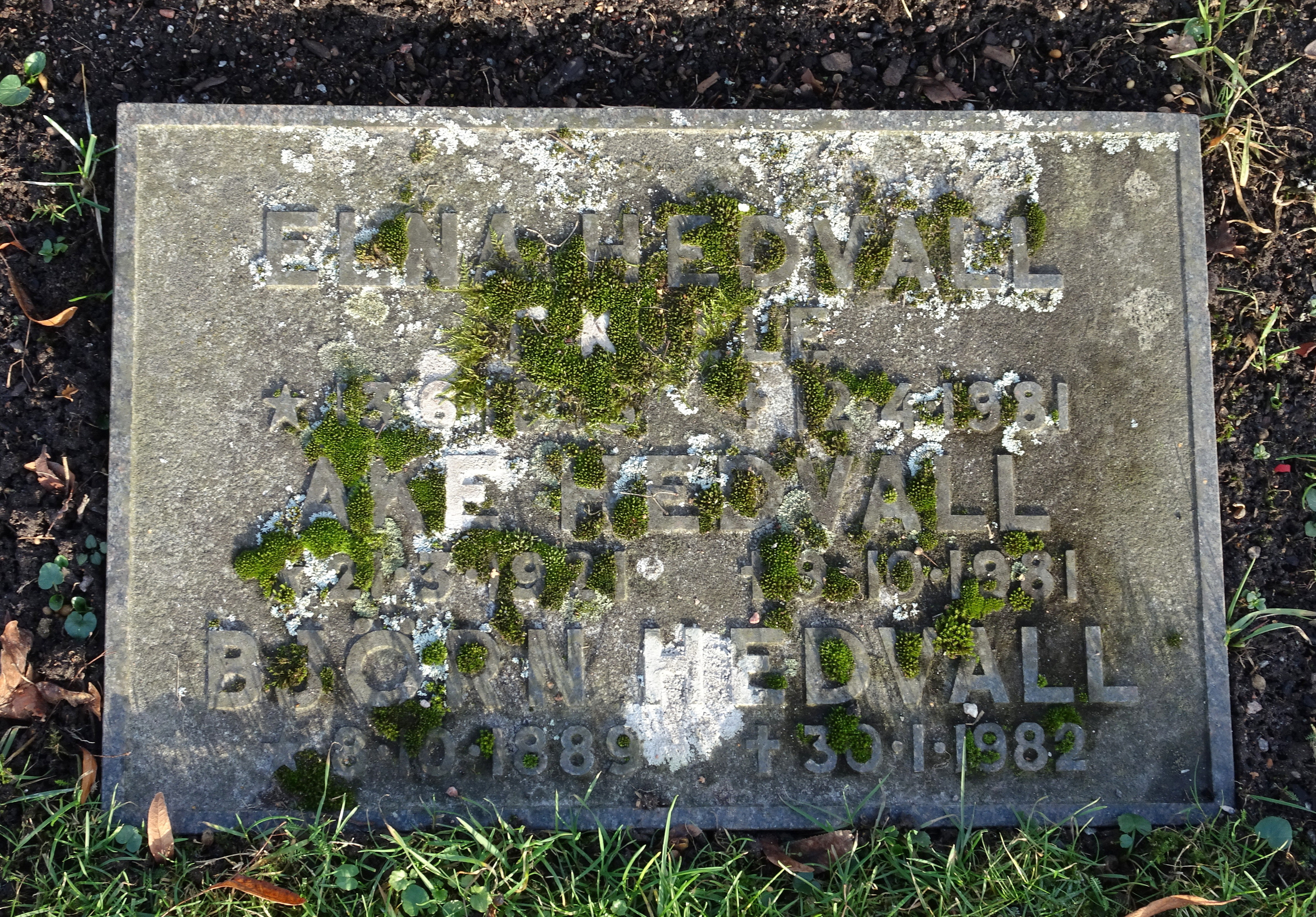 Björn och Elna Hedvalls familjegrav på Norra begravningsplatsen